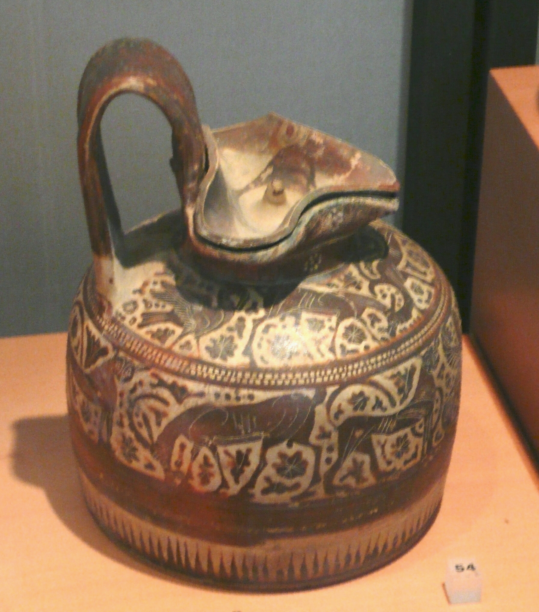 Oenochoé 625-600 av J.C., antiquités classiques du musée d’archéologie méditerranéenne de la vieille charité à Marseille